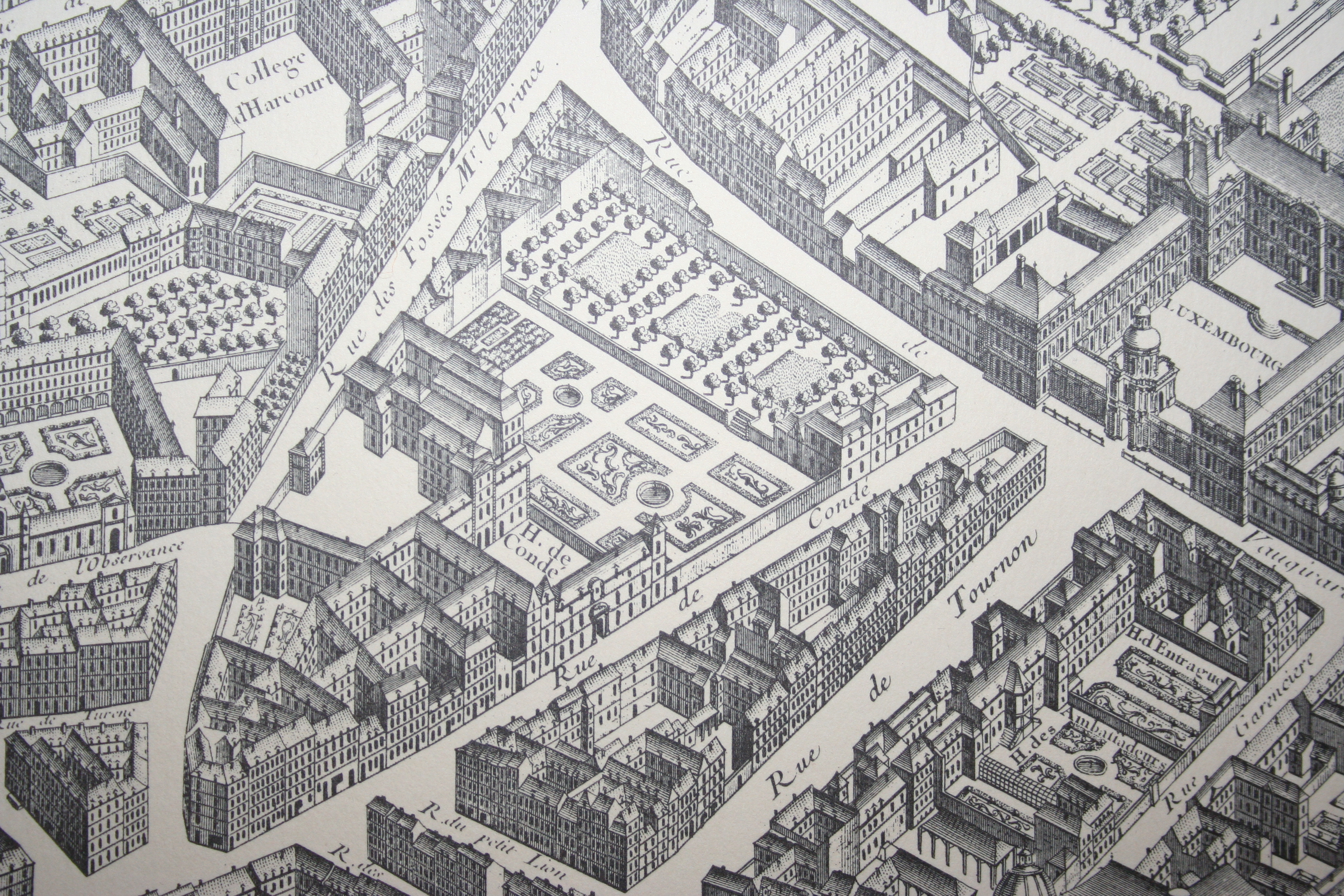 hôtel de Condé, résidence à Paris des princes de Condé entre 1612 et 1770, d'après le plan de Turgot. Le théâtre de l'Odéon a été construit de 1779 à 1782 dans les jardins de l'hôtel.